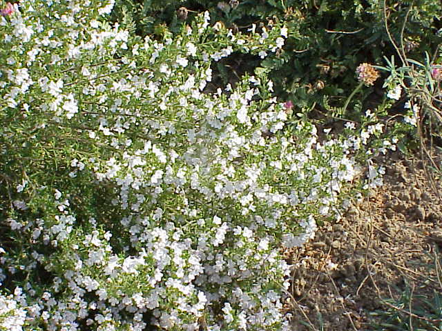 Species: Satureja montana Family: Lamiaceae Image No. 3